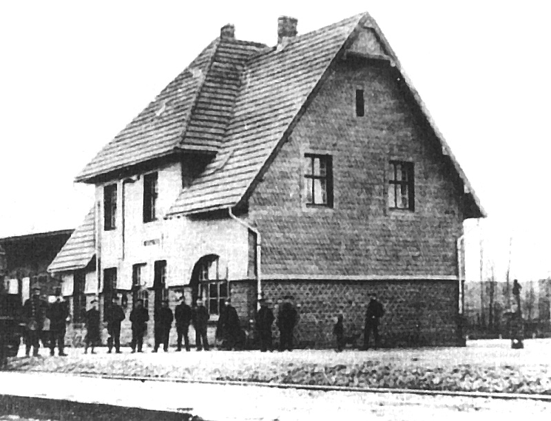 Bf Körrenzig